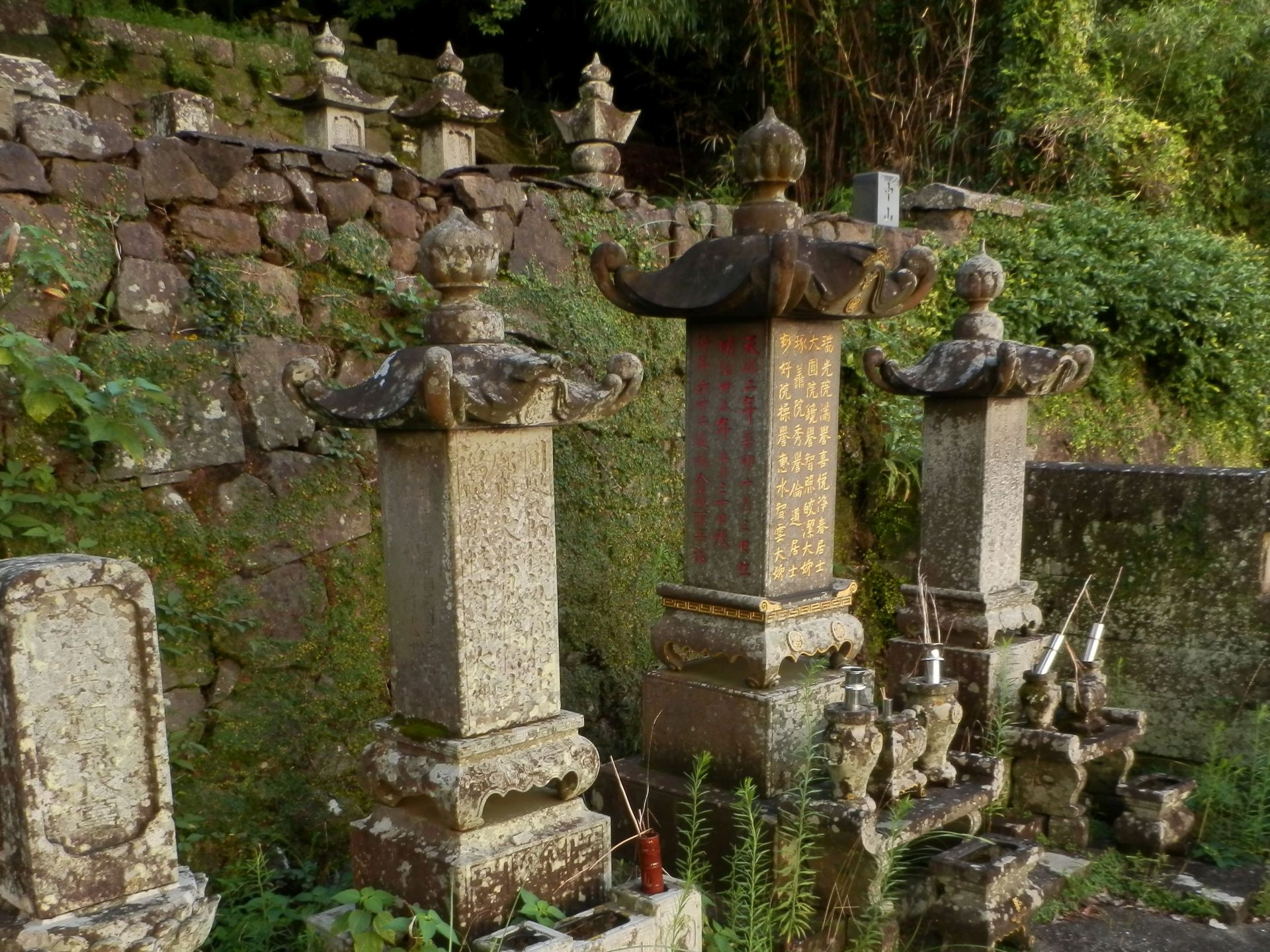 倉成正ら倉成氏一族の墓所